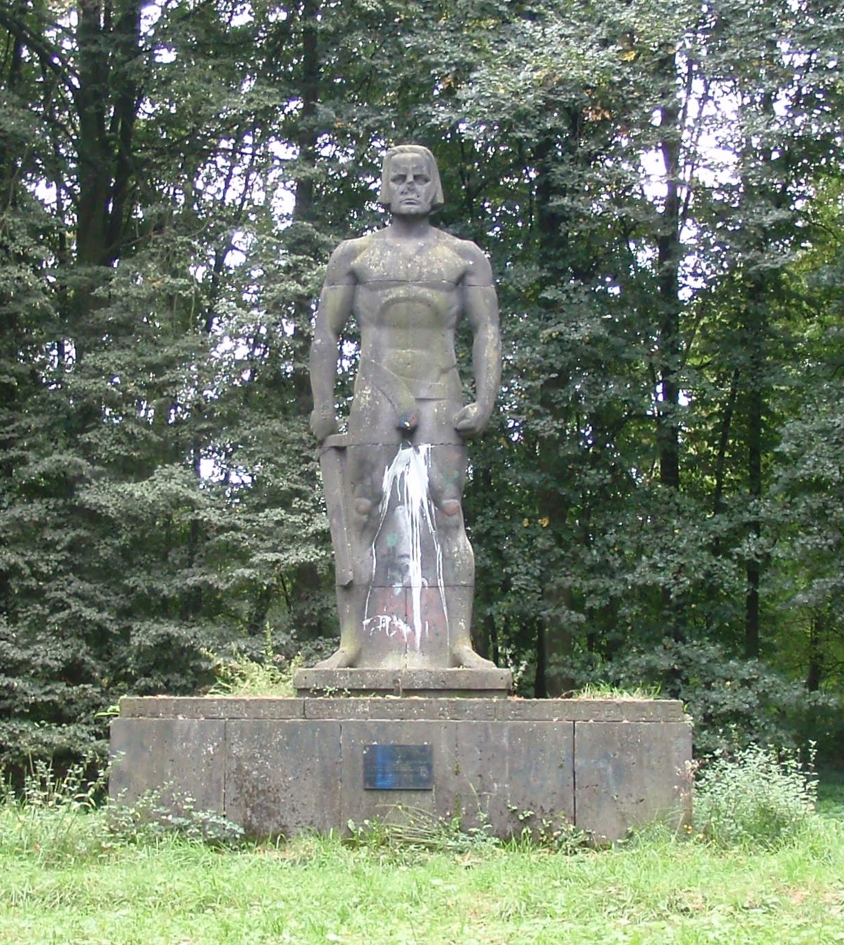 Siegfried-Statue in Sankt Augustin-Hangelar, Deutschland.